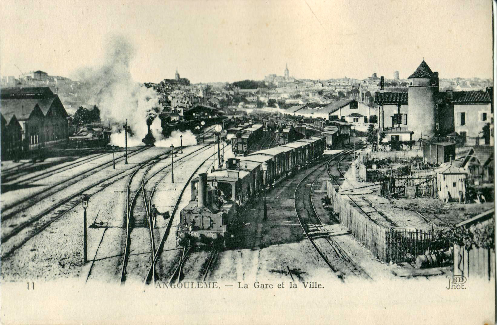 Carte postale ancienne éditée par ND, n°11 : ANGOULÈME - La Gare et la Ville